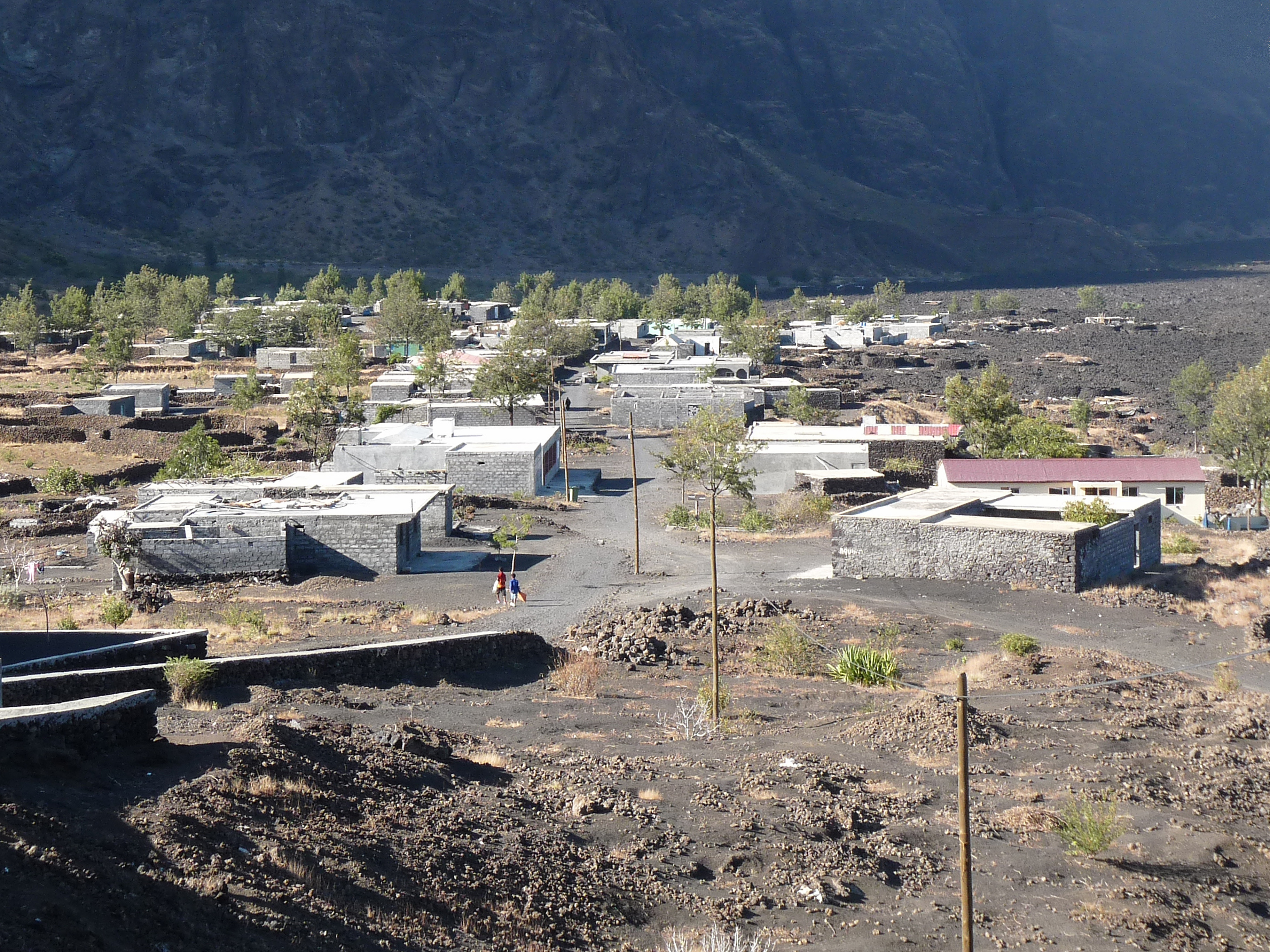 Chã das Caldeiras (île de Fogo, Cap-Vert) : village de Bangaeira